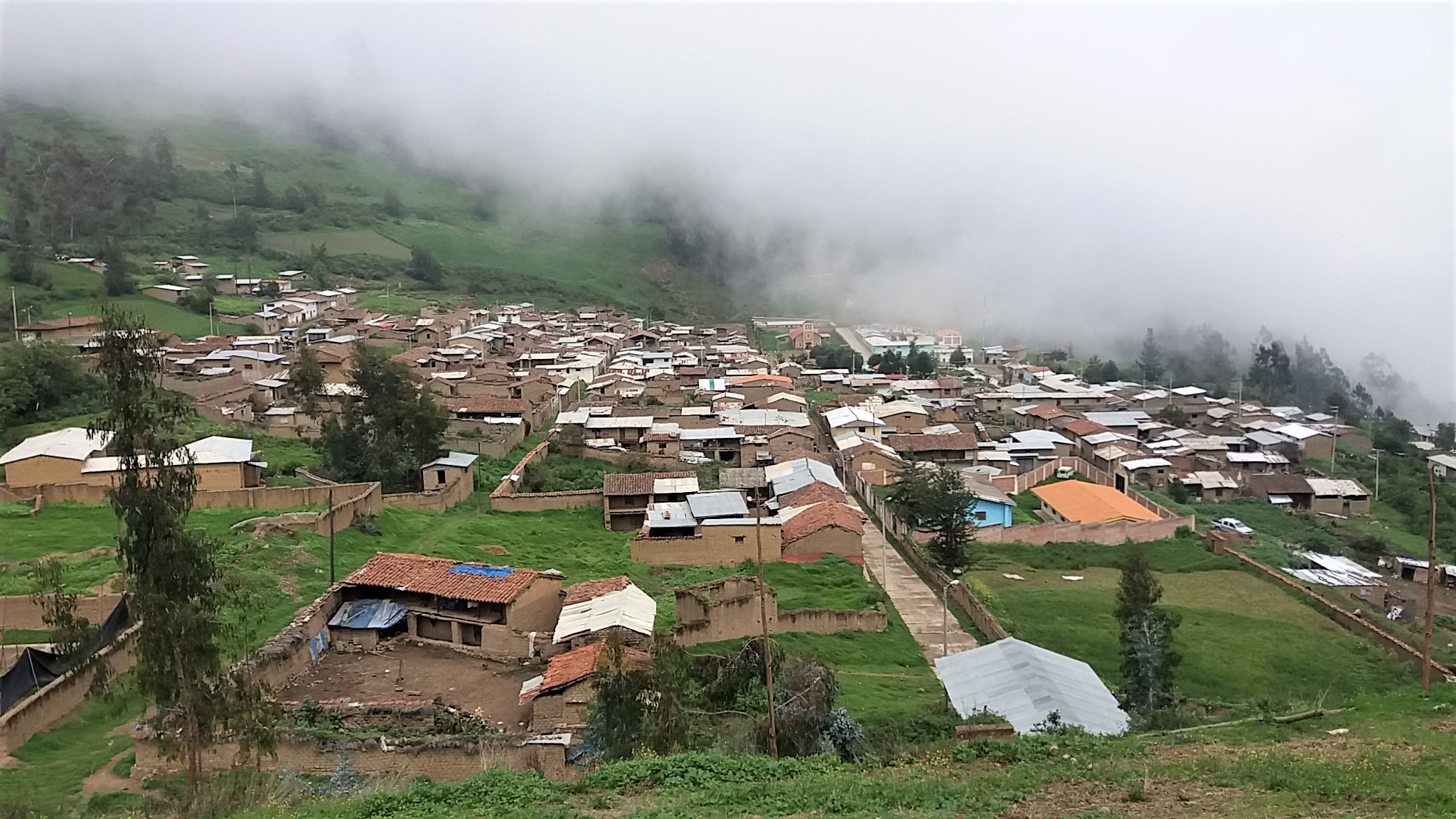 Vista desde el este del pueblo de Succha en época de lluvias.